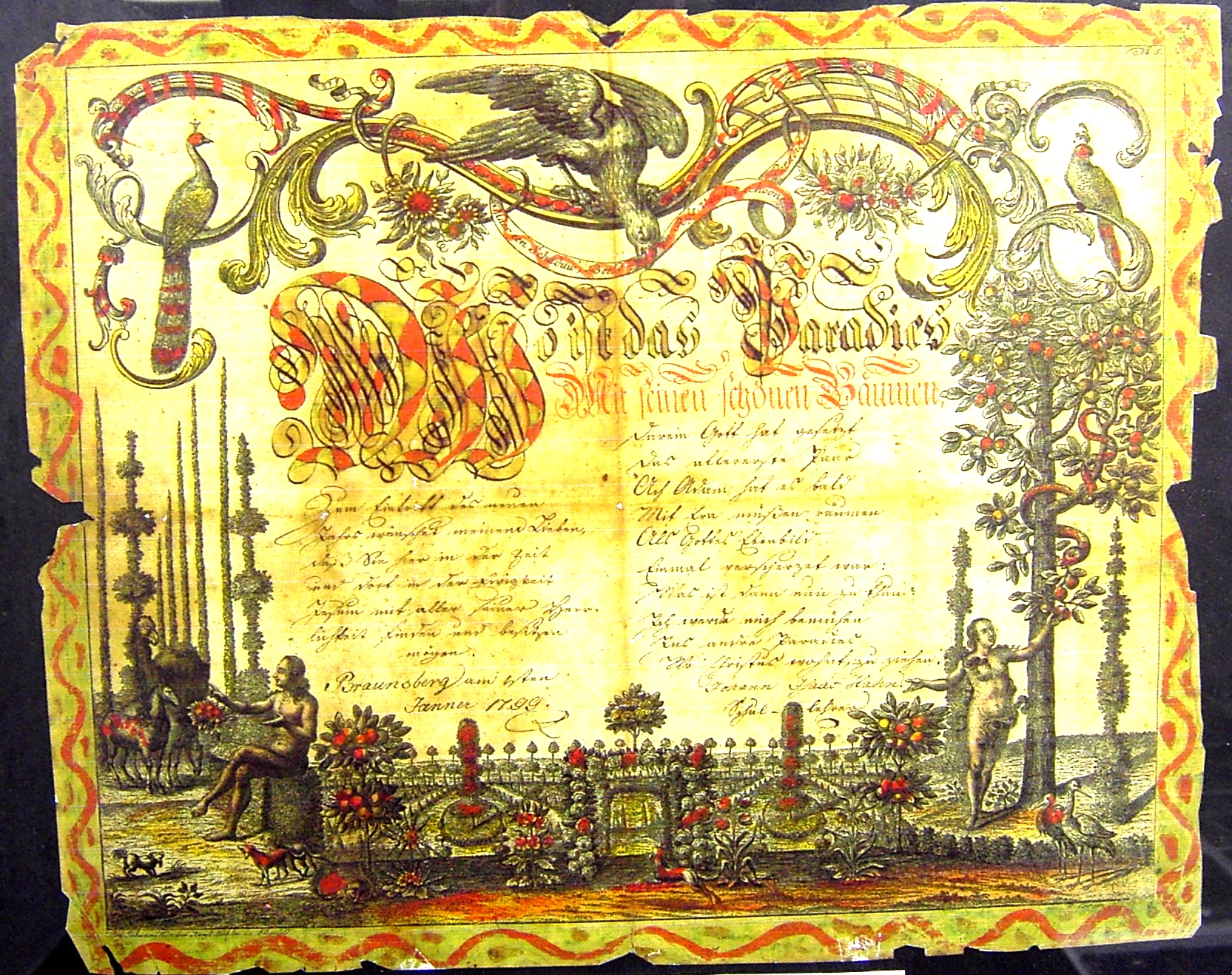 Dankesschreiben des Lehrer Hahn, Wermelskirchen Braunsberg später Tente von 1799